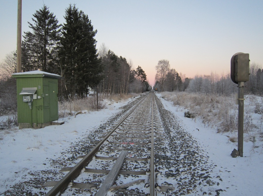 Roset holdeplass på Rørosbanen lå i sin tid til venstre for sporet her.